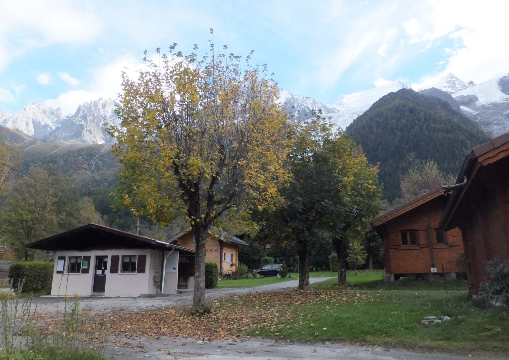 Érable sycomore, taillé comme un platane tous les 3/4 ans.